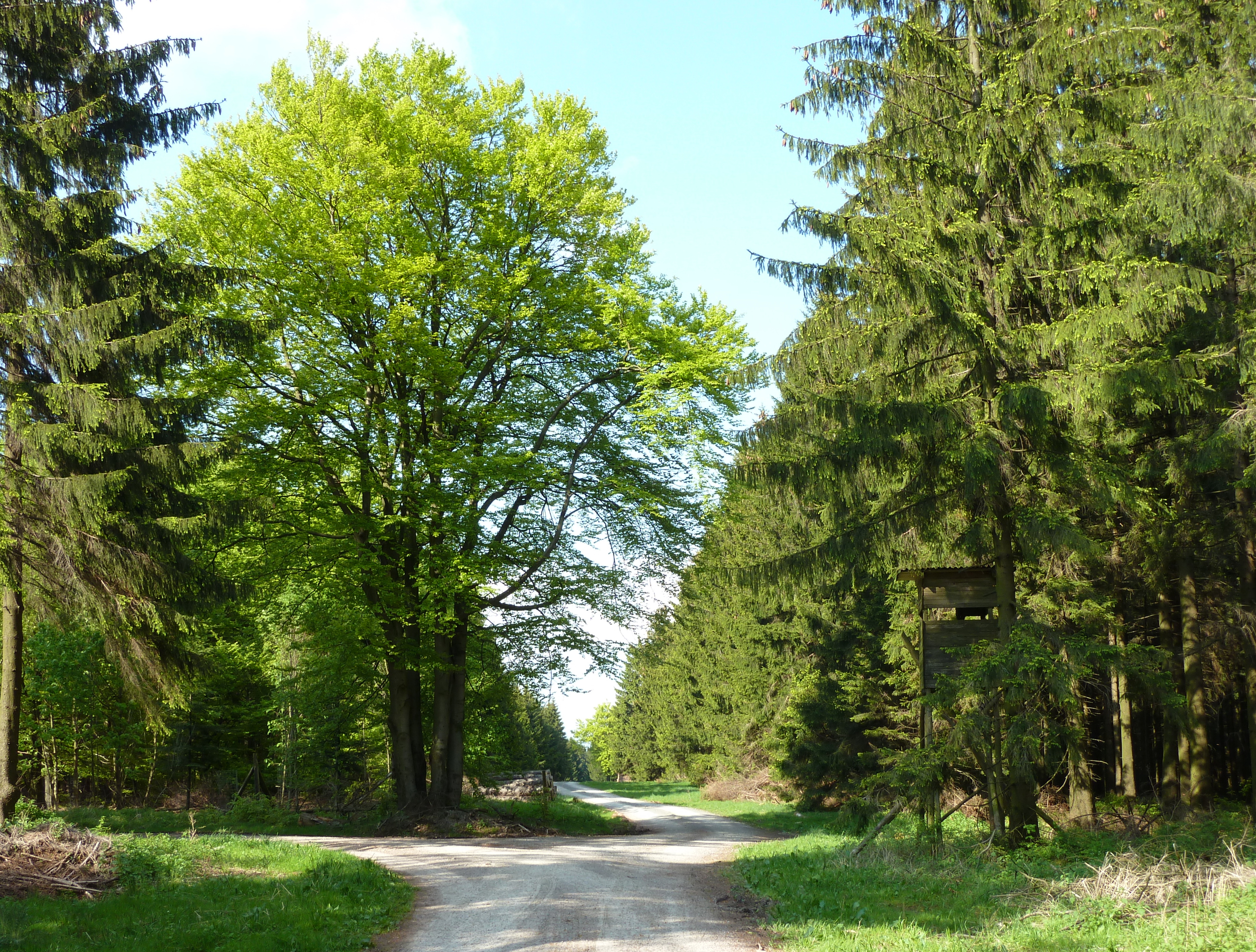 Blick von Südwesten auf den Gipfelbereich des Großen Ahrensbergs im Solling (links der Bildmitte). Links abzweigend die Leitzmannstraße (Richtung Schießhaus).